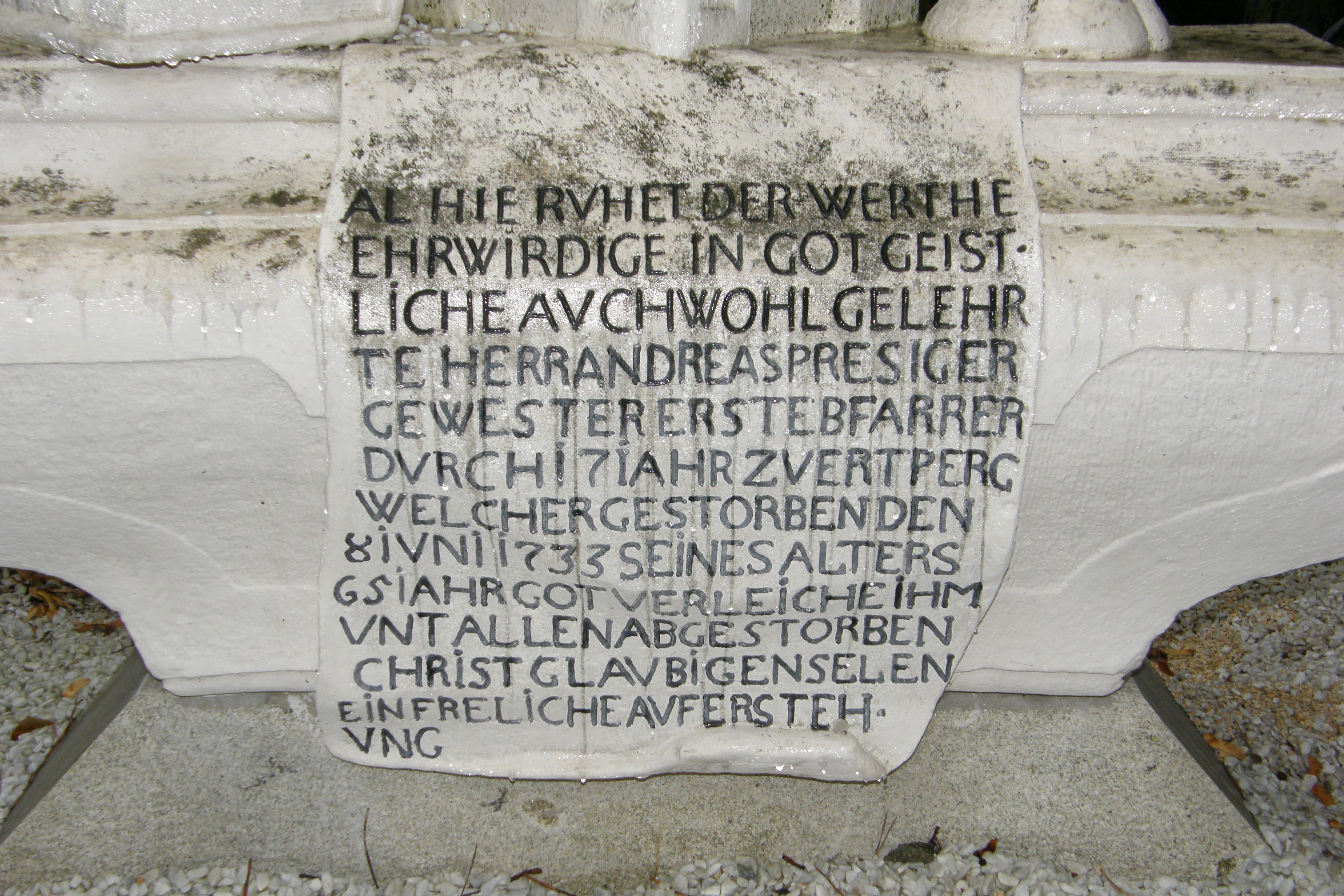 Grabdenkmal/Epitaph